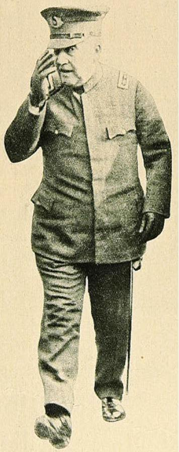 Mariano Navarrete, Inspector general del Ejercito de Chile en 1925